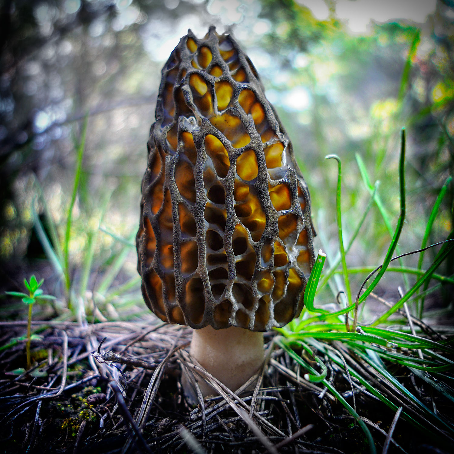 Morchella elata var. purpurascens This is a photography of Natura 2000 protected area with ID GR3000001